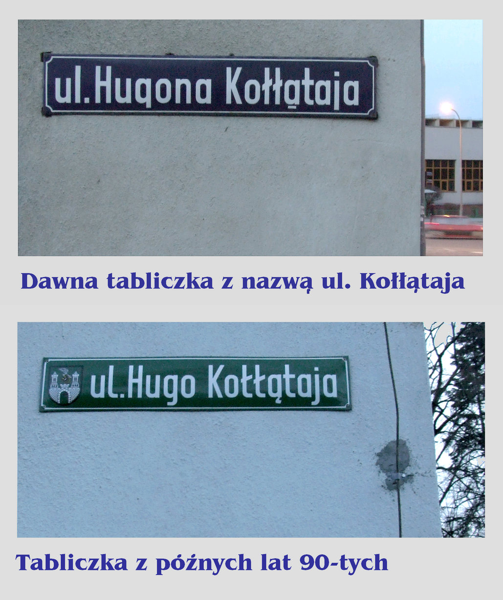 Spór o deklinacje imienia "Hugo" na tabliczkach w Zielonej Górze. Na ulicy Hugona Kołłątaja, rzecz jasna ;) autor: Mohylek 17:40, 1 February 2007 (UTC)